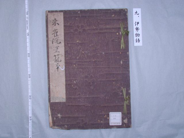 朱雀院塗籠本（伊勢物語）の表紙。国文学研究資料館所蔵。